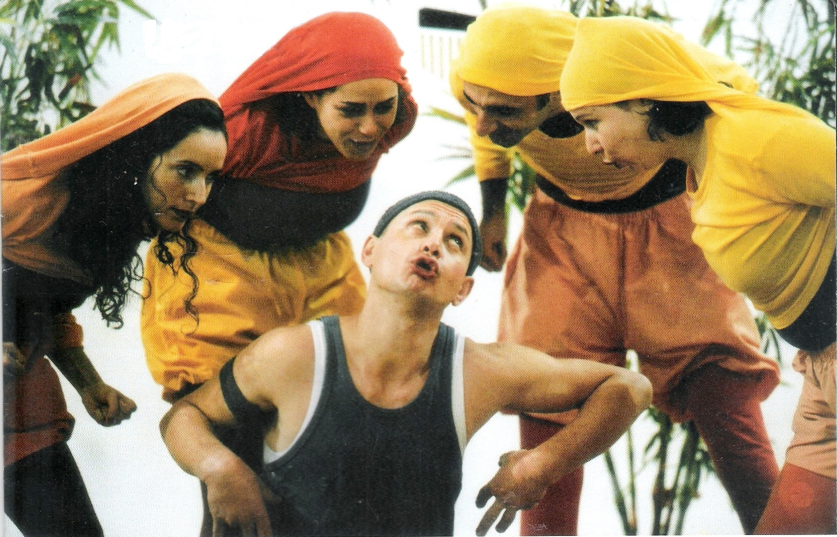 רפי אדיר בהצגה הברווזון המכוער בתיאטרון אורנה פורת